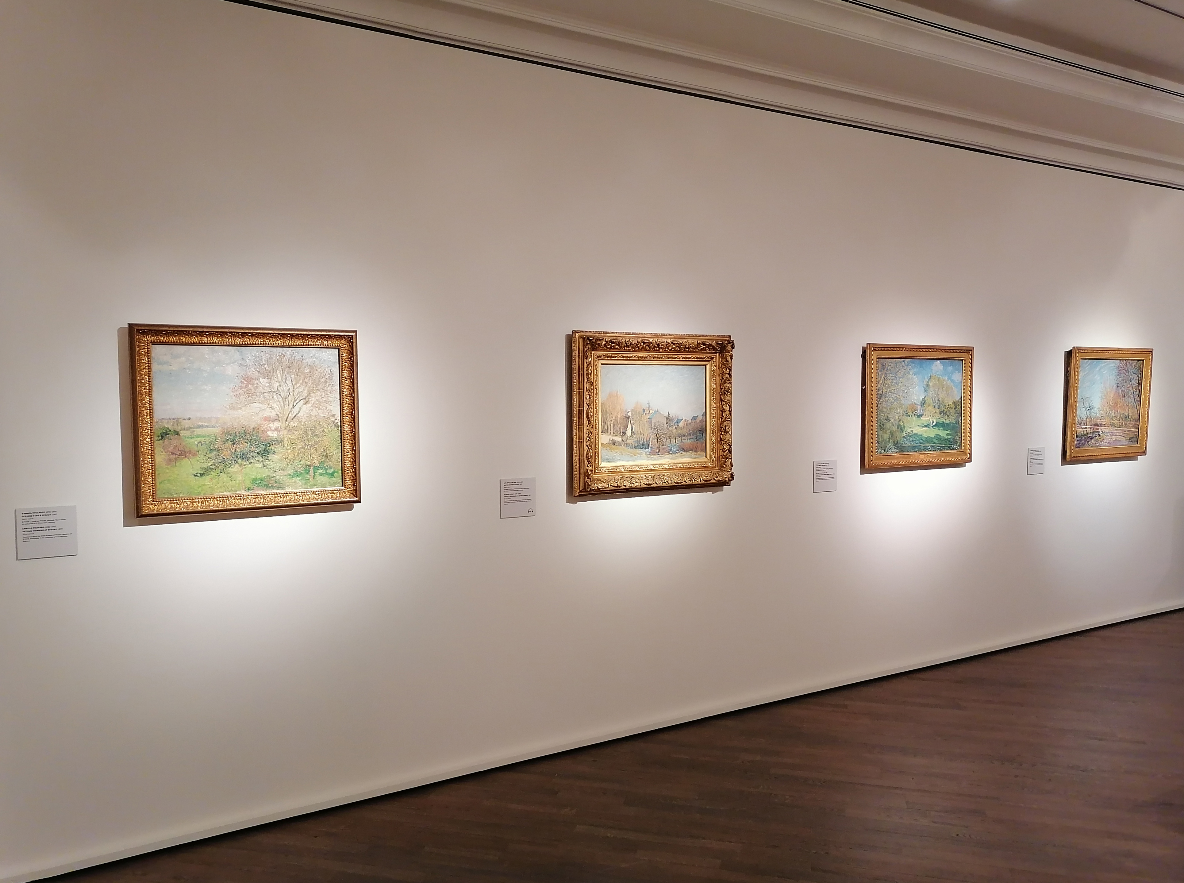 Пушкинский музей, галерея искусства 19-20 веков. Слева направо: Камиль Писсарро «Осеннее утро в Эраньи»; Альфред Сислей «Мороз в Лувесьенне», «Сад Ошеде, Монжерон», «Опушка леса в Фонтенбло»